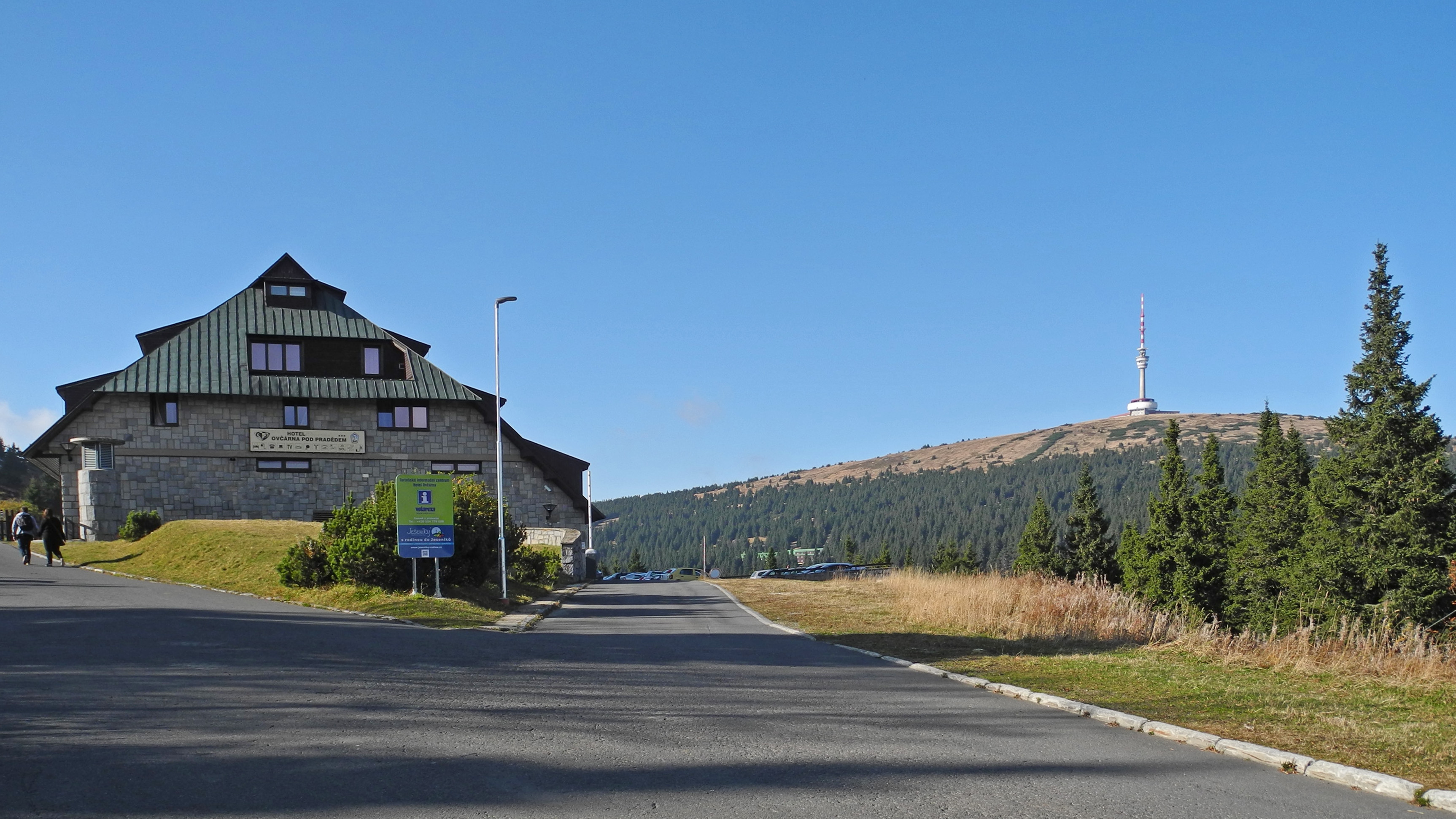 Bergbaude Ovčárna am Praděd (Altvater, 1491 m) im Altvatergebirge